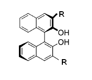 Asymetresch Hydroaminatioun, Binaphtholate = Ligant